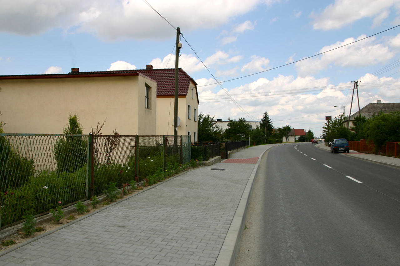 Dębina (dodatkowa nazwa w j. niem. Dambine) – wieś w Polsce położona w województwie opolskim, w powiecie prudnickim, w gminie Biała.